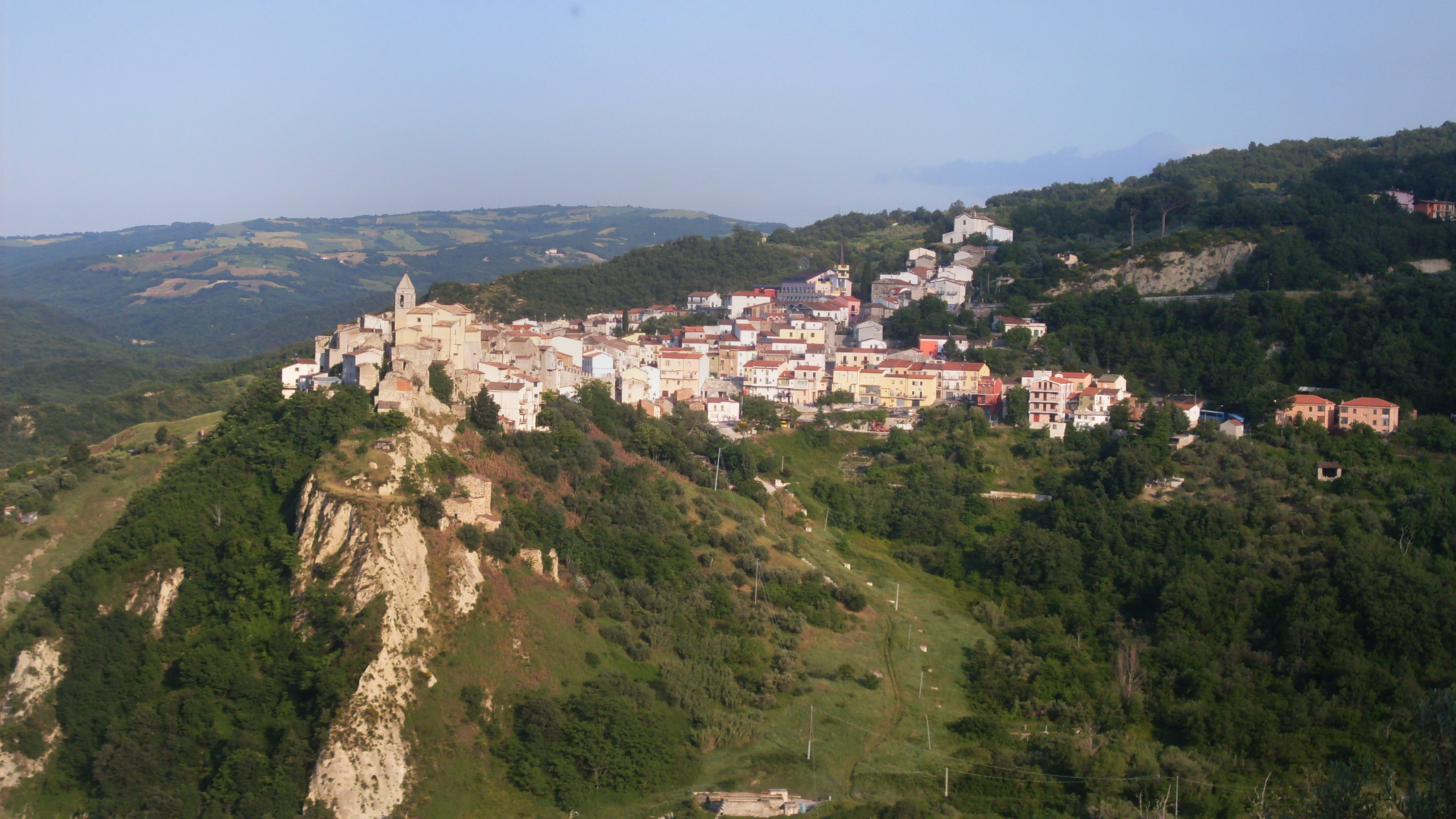 autore= Ferrante Giovanni fonte= foto propria descrizione= veduta Castellino del Biferno